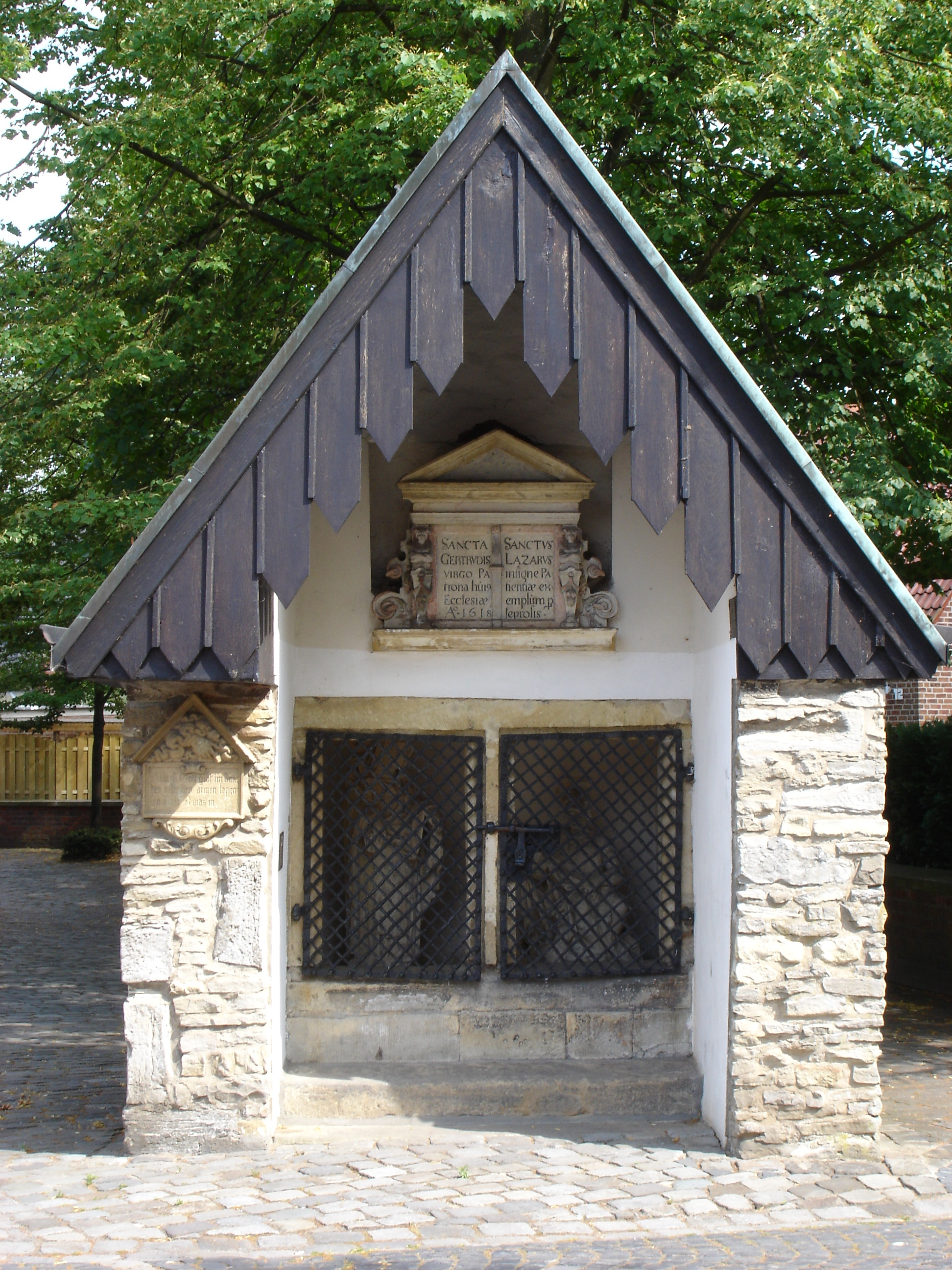 Das "Lazarushäuschen" des Lepramuseums im Stadtteil Kinderhaus in Münster, Westfalen, Germany